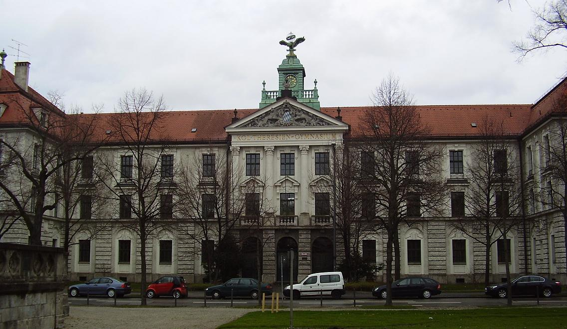 Theresien-Gymnasium in München (Munich / Germany; Fassadengestaltung: Architekt Emanuel von Seidl.)